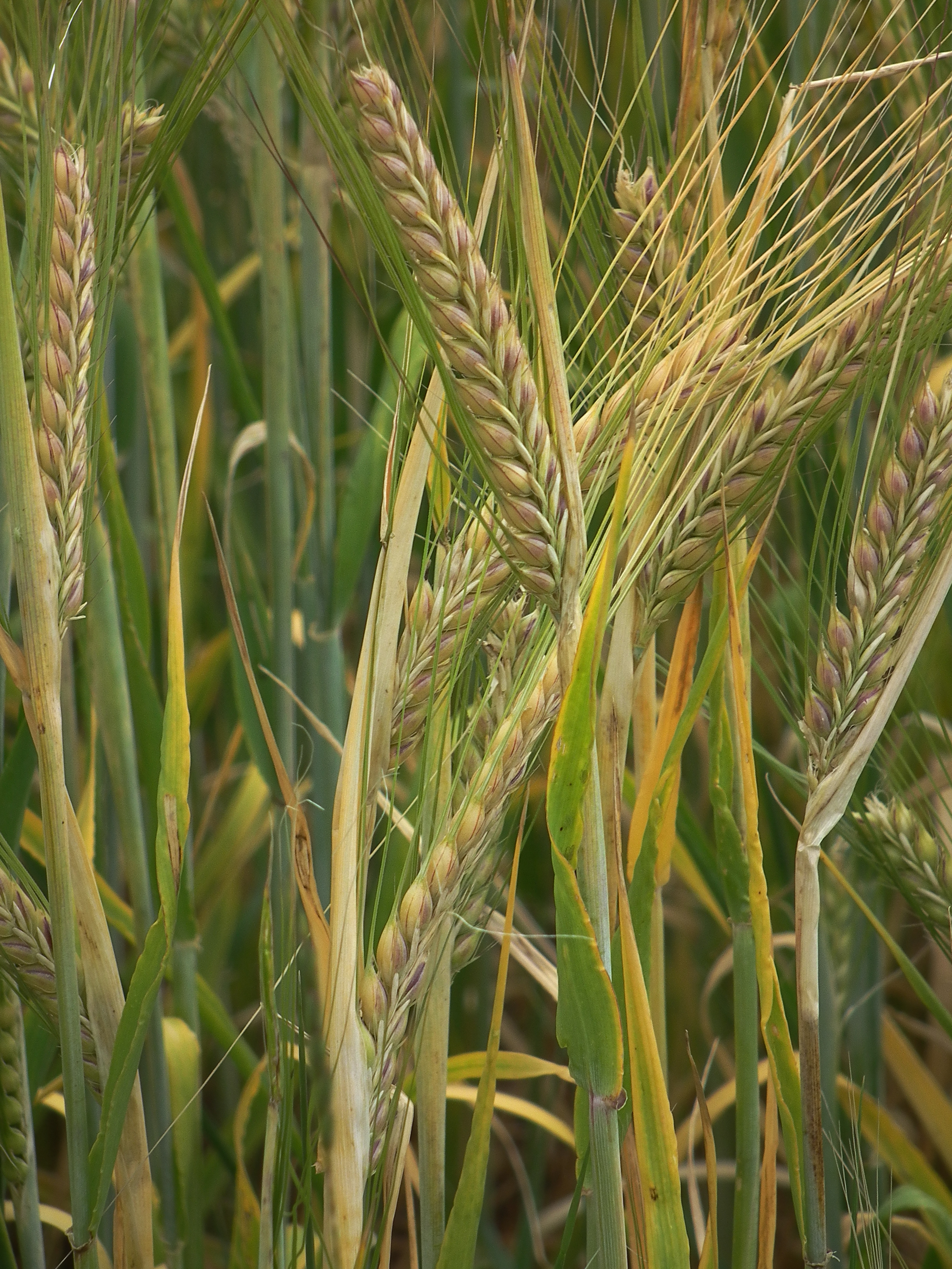 Sommergerste "Propino", Kategorie Z 1, Schlagbezeichnung: In den Grenzhöfer Dosen (011), fotografiert in Heidelberg (Baden-Württemberg, Deutschland)